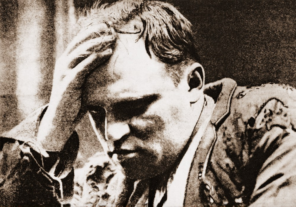 артист и шансонье Станислав Сарматов, журнальная фотография 1910-х годов